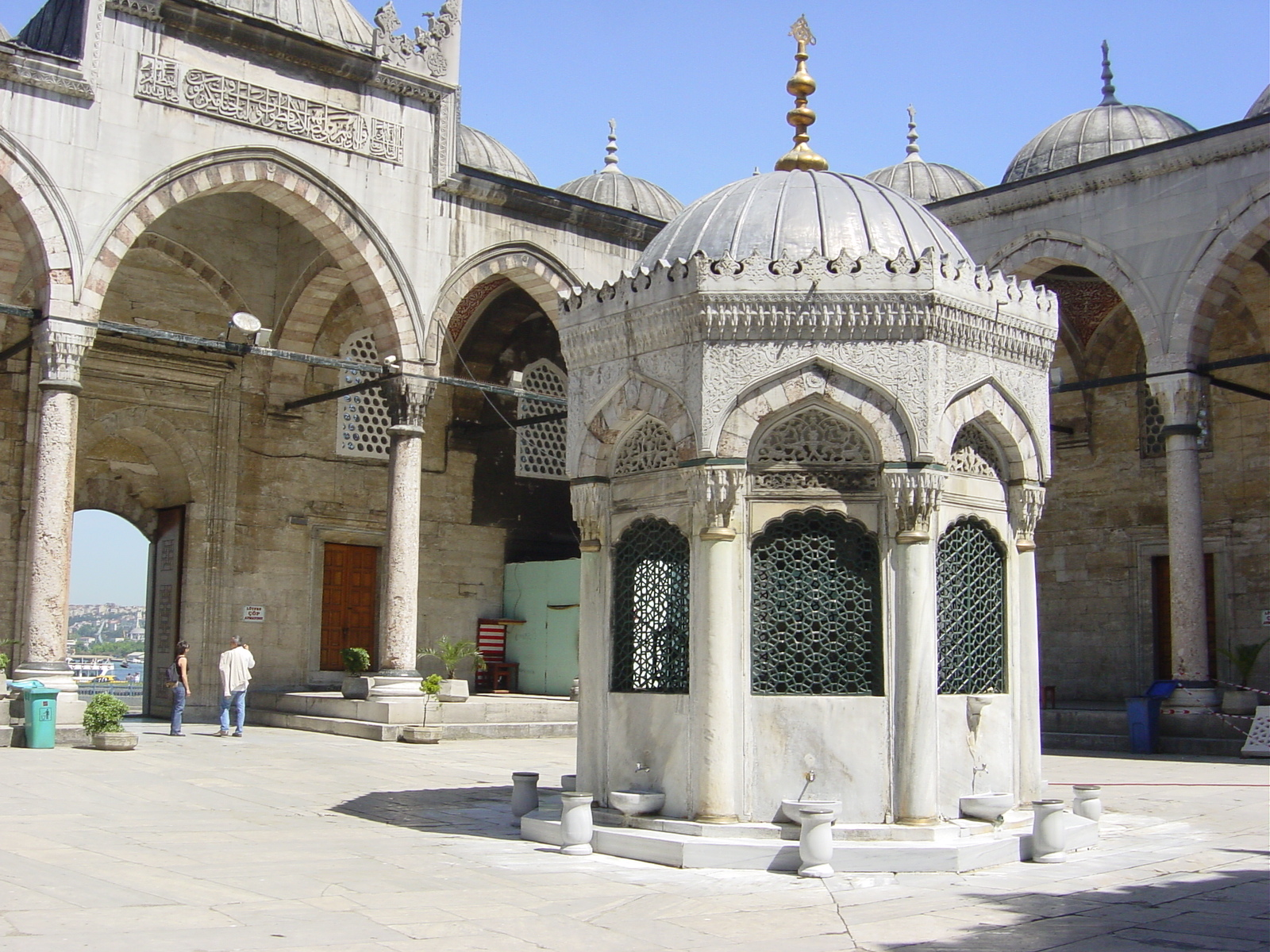 L'antica fontana rituale, per le abluzioni precedenti la preghiera, nel cortile della Yeni camii ("la Moschea nuova"; pronuncia: "Ieni giamìi") d'Istanbul. Foto di: Giovanni Dall'Orto, 27-5-2006.